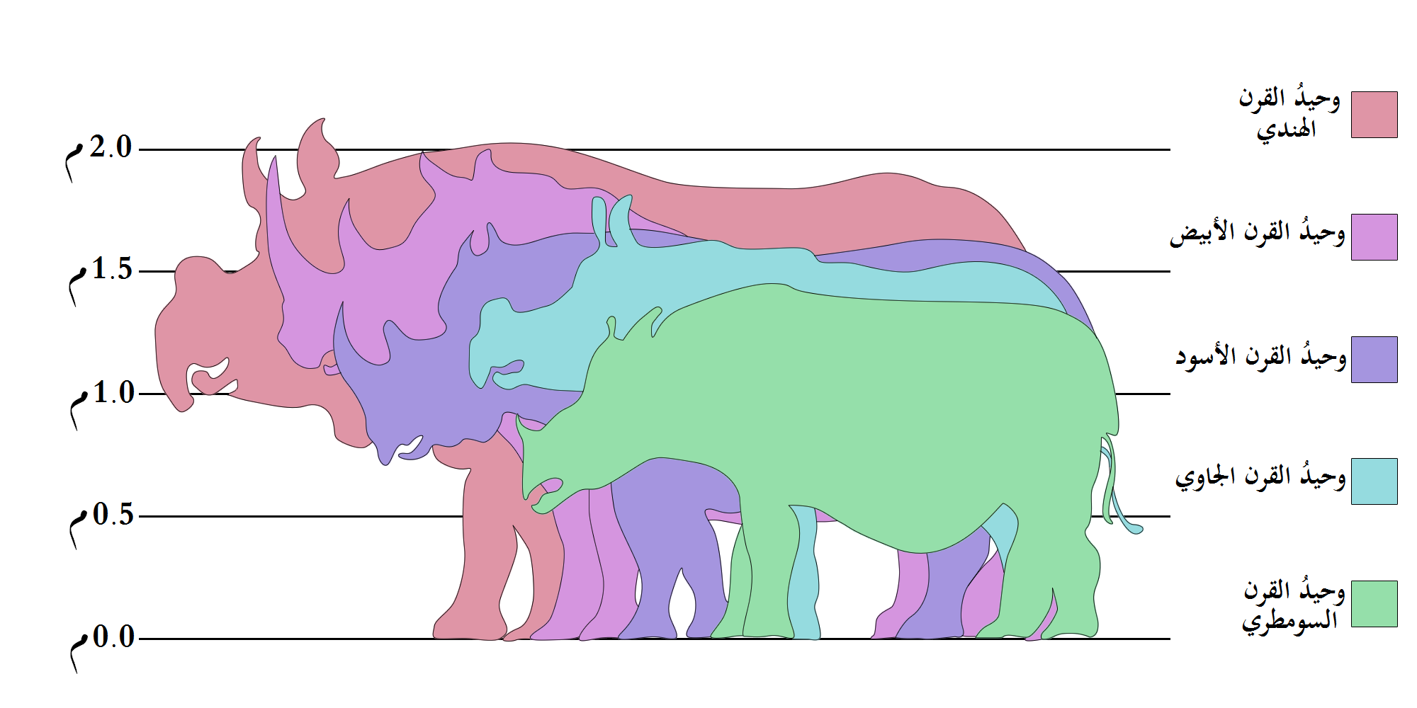 رسمٌ بيانيٌّ يُظهرُ مُقارنةً بين أنواع وحيد القرن الباقية اليوم: وحيد القرن الهندي، ما يزيد عن 1.8 أمتار وحيد القرن الأبيض، 1.8 أمتار وحيد القرن الأسود، أكثر من 1.5 أمتار وحيد القرن الجاوي، 1.5 أمتار وحيد القرن السومطري، 1.4 أمتار